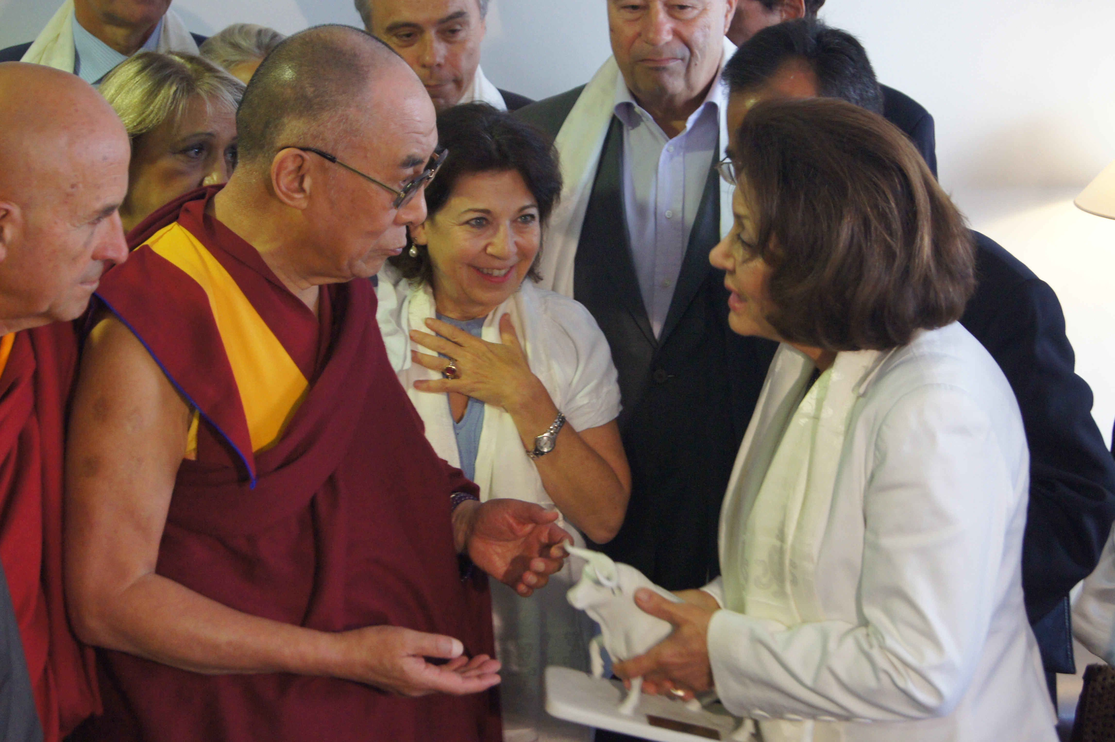 Remise d'une statuette représentant un taureau blanc par une association anti tauromachie, Rencontre des parlementaires avec sa sainteté le Dalaï Lama à Toulouse le 15 août 2011